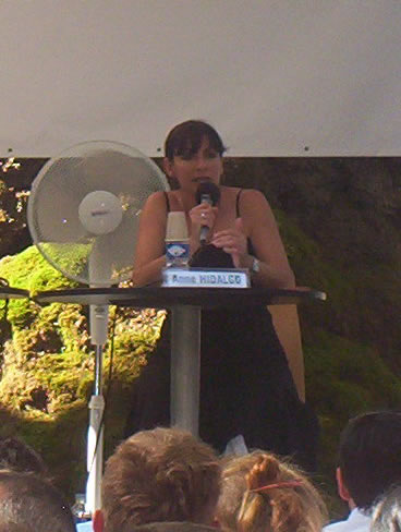 Anne Hidalgo, aux journées du SYNDEAC, Avignon